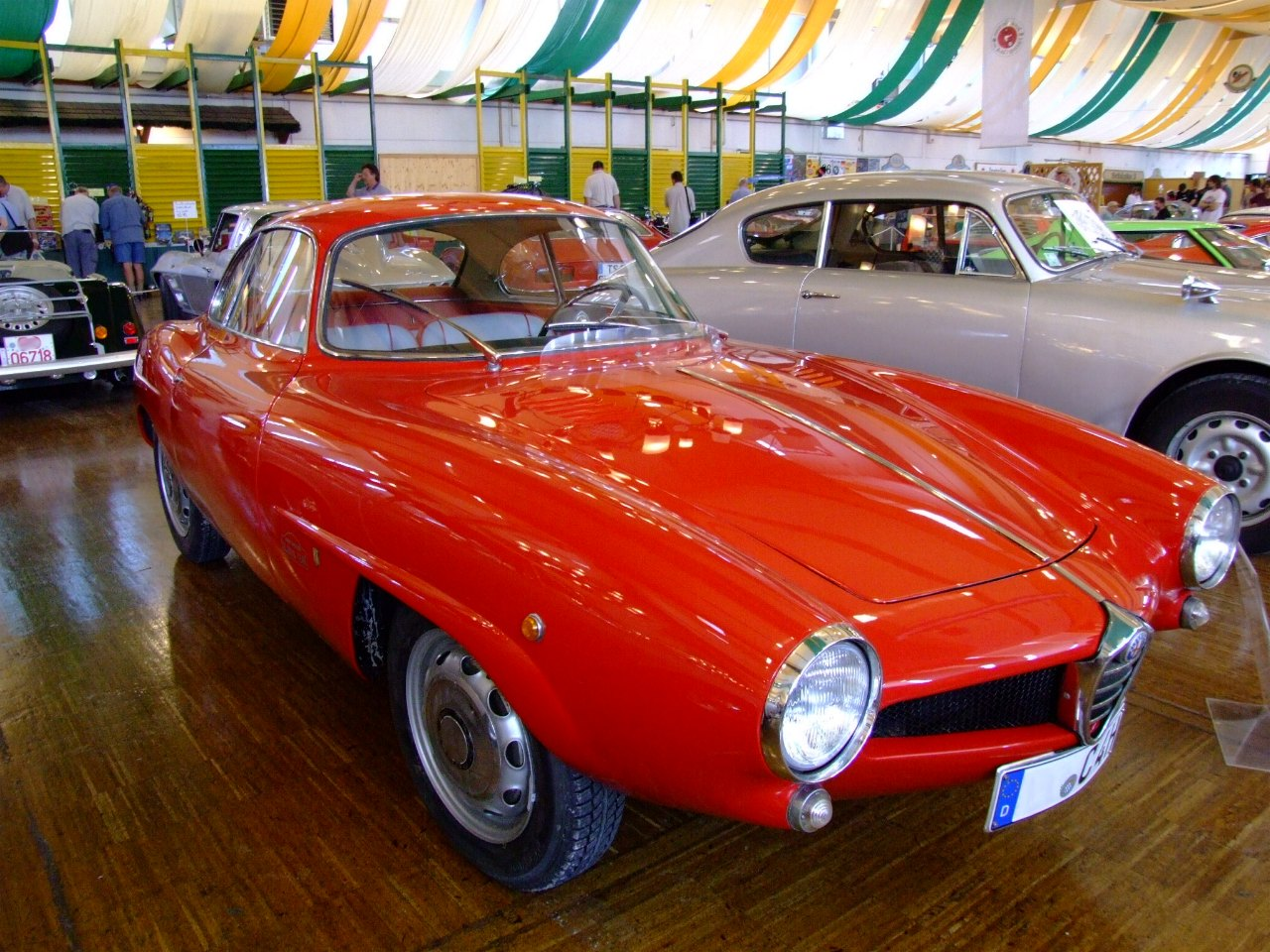 Alfa Romeo Guiletta Sprint Speciale (1962)